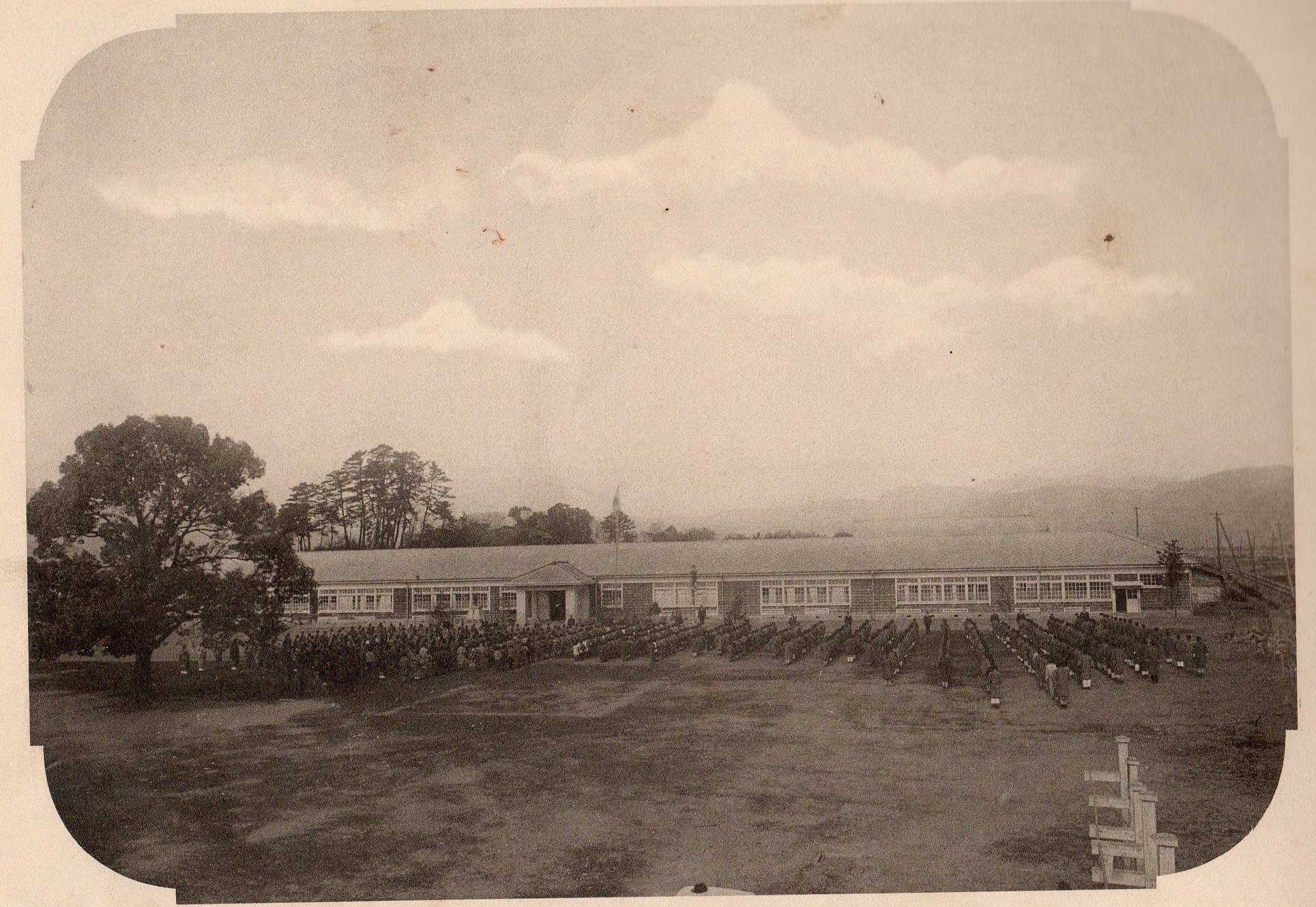 卒業記念より